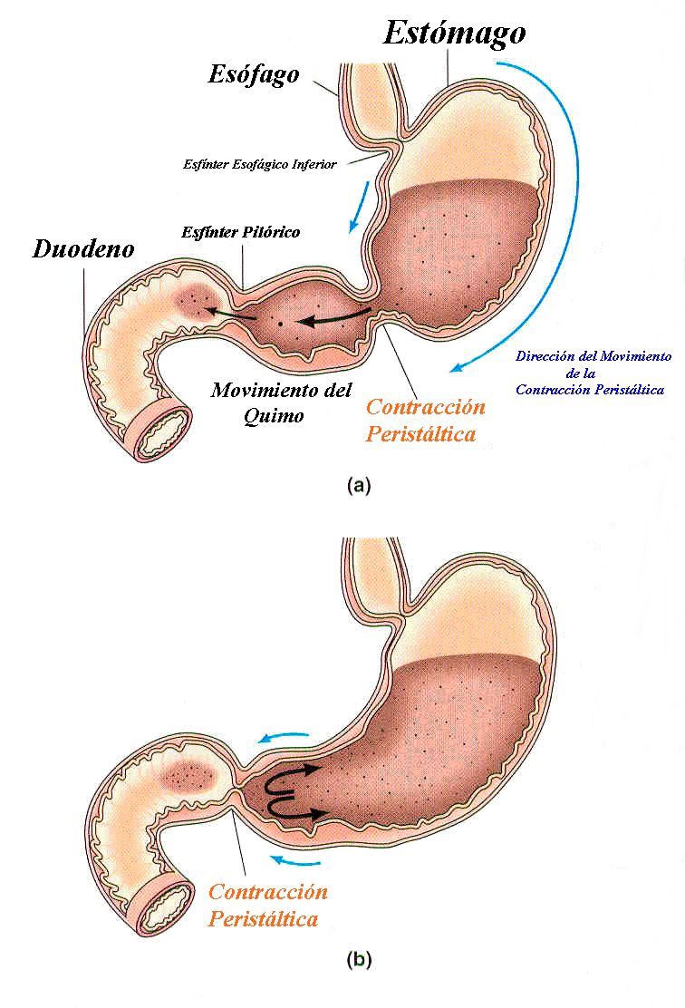 Figura 1: El vaciado gástrico y el mezclado como resultado de las contracciones peristálticas antrales. (a) Vaciado gástrico. La contracción peristáltica se origina en la parte superior del fondo gástrico y se mueve hacia abajo, hacia el esfínter pilórico, siendo cada vez más vigorosa hasta que llega a la muscular gruesa del antro. A medida que la fuerte contracción peristáltica antral propulsa el quimo hacia adelante, una pequeña porción de quimo es empujado a través del esfínter parcialmente abierto en el duodeno. Cuanto más fuerte sea la contracción antral, más quimo se vacía con cada onda contráctil. (b) Mezclado Gástrico. Cuando la contracción peristáltica alcanza el esfínter pilórico, el esfínter es herméticamente cerrado y ya no tiene lugar el vaciado. Cuando el quimo que estaba siendo impulsado hacia delante golpea el esfínter cerrado, vuelve hacia el antro. La mezcla del quimo se realiza con el quimo impulsado hacia delante y hacia atrás en el antro gástrico con cada contracción peristáltica.